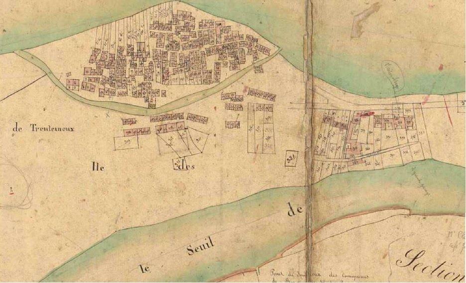 Plan partiel de la commune de Rezé en 1826